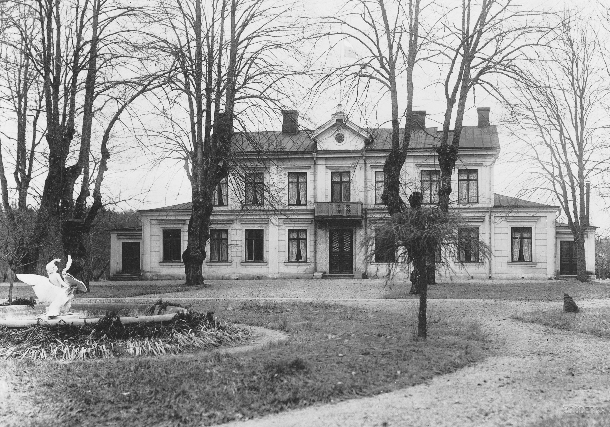 Fågelsta gård, fasad mot norr